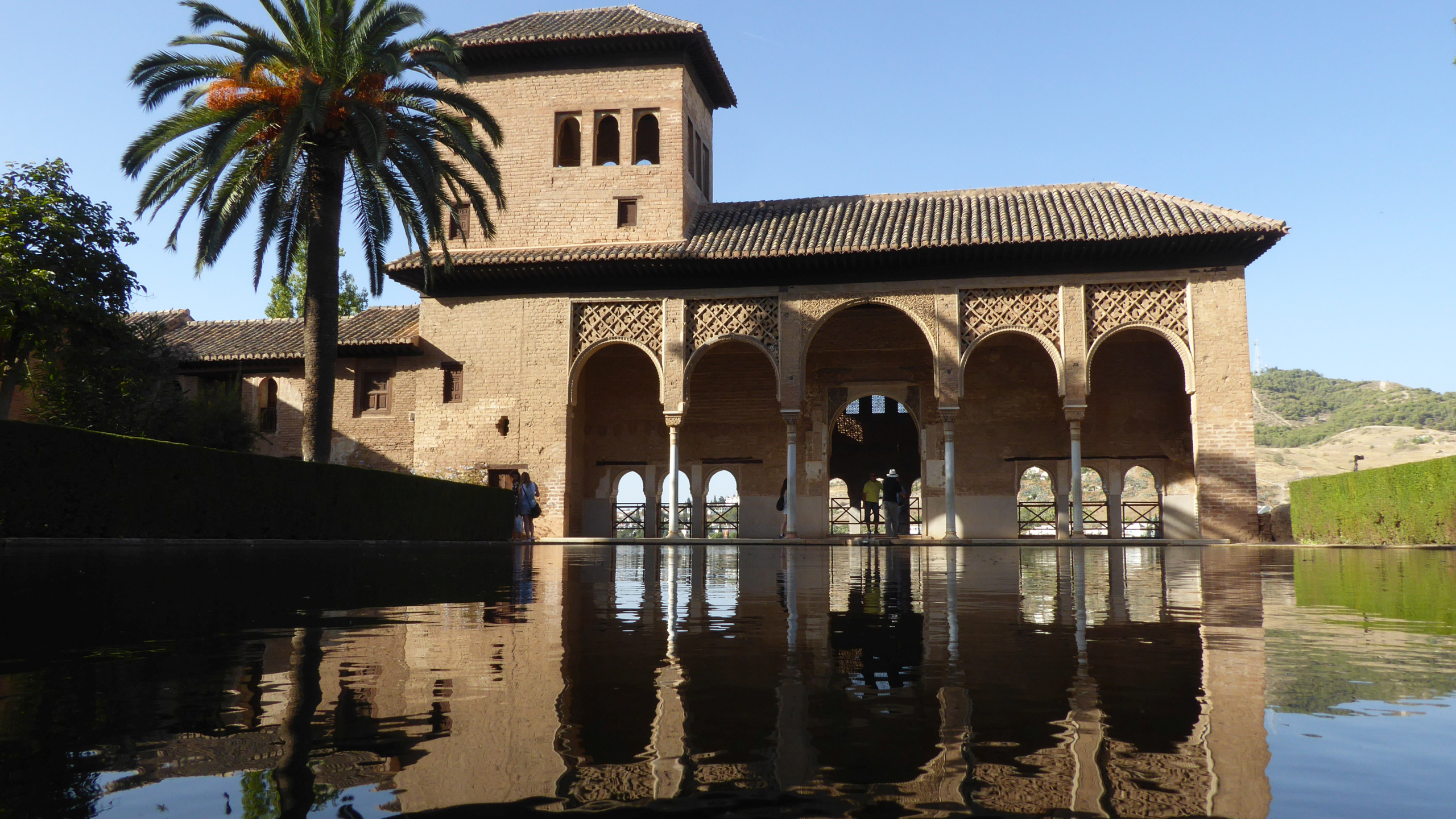 "Damenturm", Torre del Príncipe, zumeist: der maurische Torre de las Damas, mit ältester Deko/Fassade/Mauerwerk auf der Nordseite in den Partalgärten (Gärten der Galerien/Portiken) oberhalb der Nasridenpaläste - Alhambra Andalusien Spanien Foto WOlfgang Pehlemann P1100764